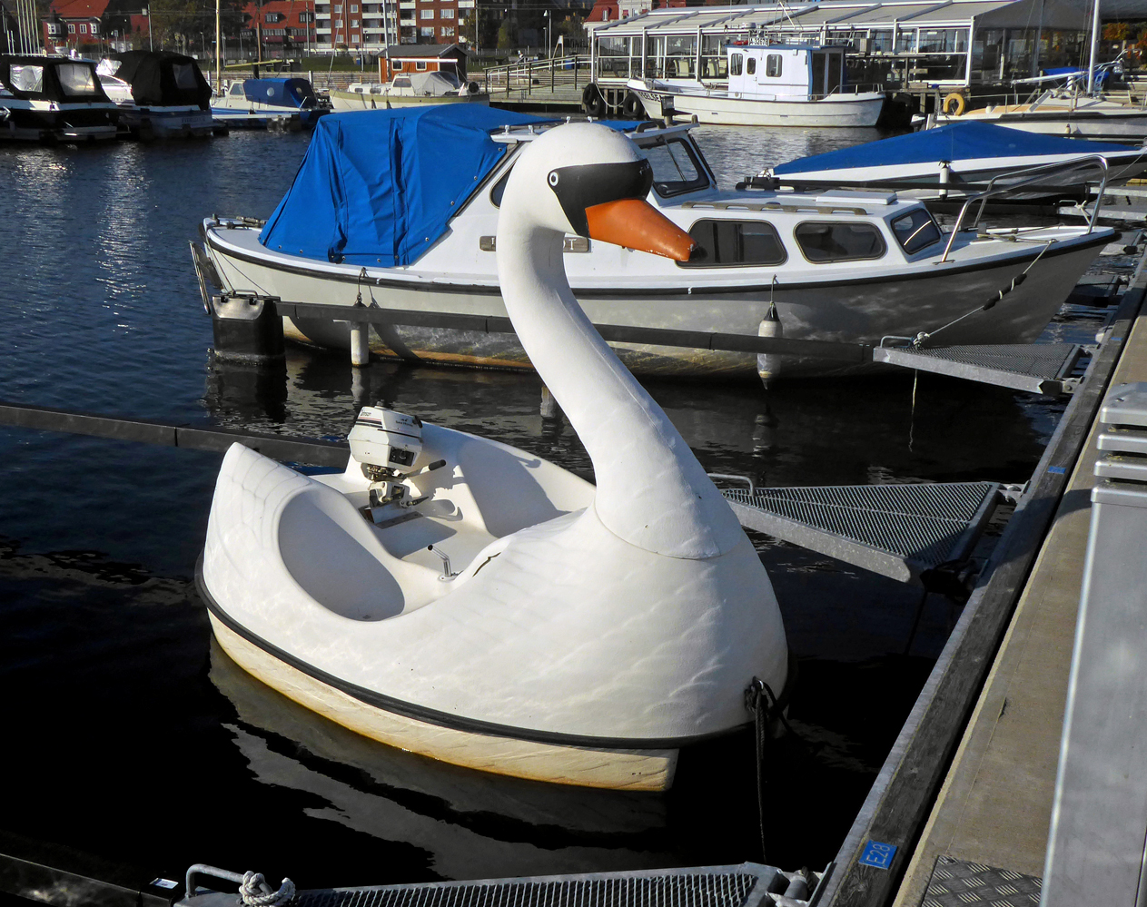 En nöjesbåt i form av en Svan, gjord i plastmaterial. Ystads Småbåtshamn 14 okt 2018.